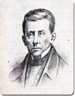 Gravure de la première moitié du XIXème siècle représentant un portrait de Gregorio José Ramírez y Castro (1796-1823), marin, homme politique et militaire costaricain.